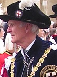 2014年6月19日、サー・アンソニー・アクランド